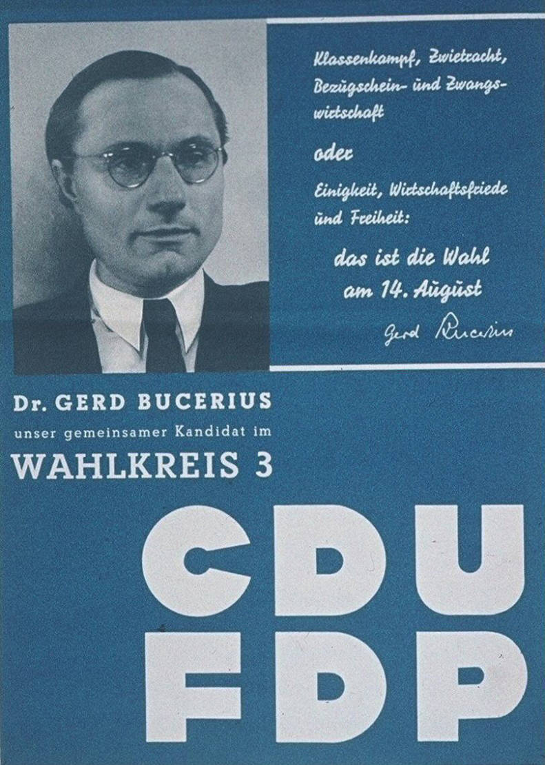 Klassenkampf, Zwietracht, Bezugsschein- und Zwangswirtschaft oder Einigkeit, Wirtschaftsfriede und Freiheit: das ist die Wahl am 14. August Dr. Gerd Bucerius unser gemeinsamer Kandidat im Wahlkreis 3 CDU FDP Abbildung: Porträtfoto Plakatart: Kandidaten-/Personenplakat mit Porträt Objekt-Signatur: 10-001: 108 Bestand: Plakate zu Bundestagswahlen (10-001) GliederungBestand10-18: Plakate zu Bundestagswahlen (10-001) » Die 1. Bundestagswahl am 14. August 1949 » CDU » Mit Porträtfoto Lizenz: KAS/ACDP 10-001: 108 CC-BY-SA 3.0 DE